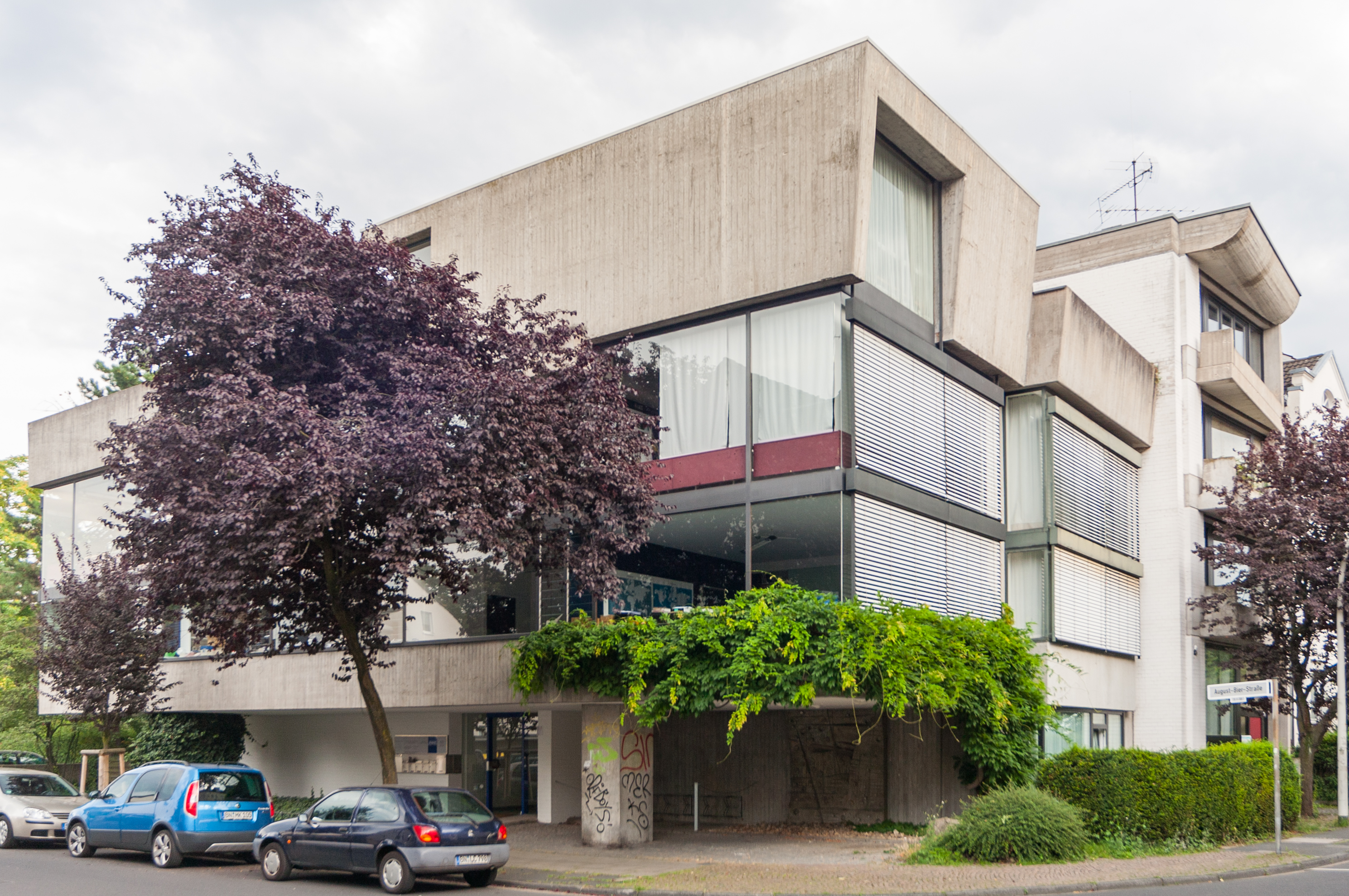 Büro- und Atelierhaus Ernst van Dorp, Bonner Talweg 215, Bonn-Kessenich: Ansicht aus Nordwest